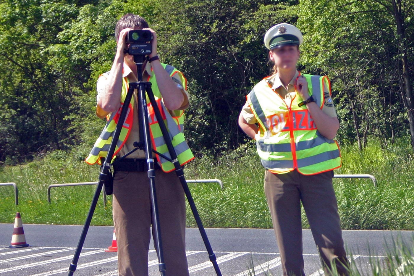 Polizeibeamter bei Geschwindigkeitsmessung mit Lasergerät Interlingue: Policites de Policie Bavaria Fotograf: Christian "VisualBeo" Horvat Datum: 27.05.05 Foto: Canon EOS 300D